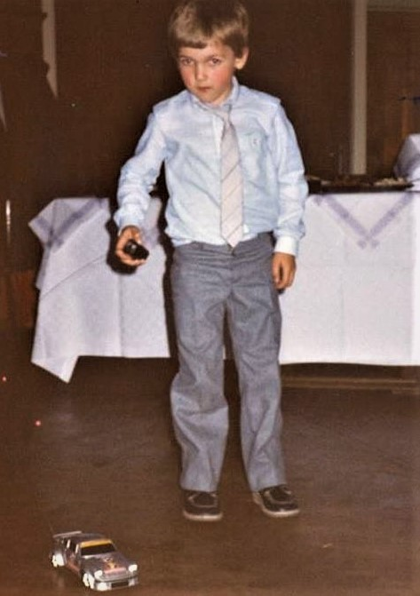 Auto met afstandsbediening met radiofrequentie (1982), foto genomen in Buggenhout.